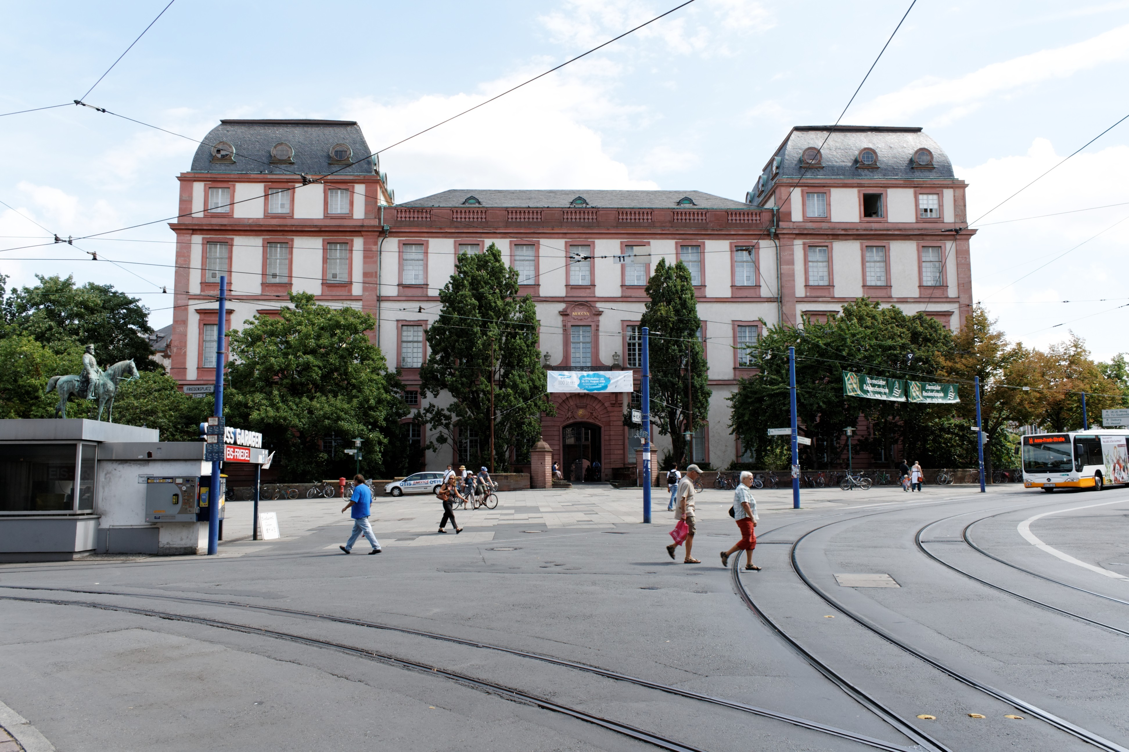 Westseite des Residenzschlosses Darmstadt